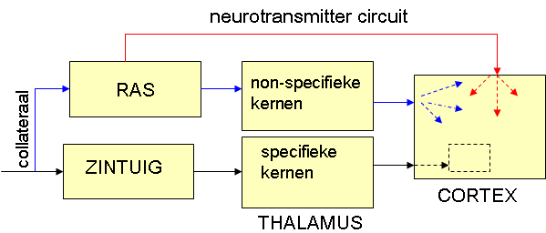 De twee corticale arousalsystemen. Rode pijlen: het neurotransmitter systeem buiten de thalamus om. Blauwe pijlen: het reticulo-thalamo-corticale systeem. Zwarte pijlen: het zintuigsysteem. RAS= Reticulair Activatie Systeem